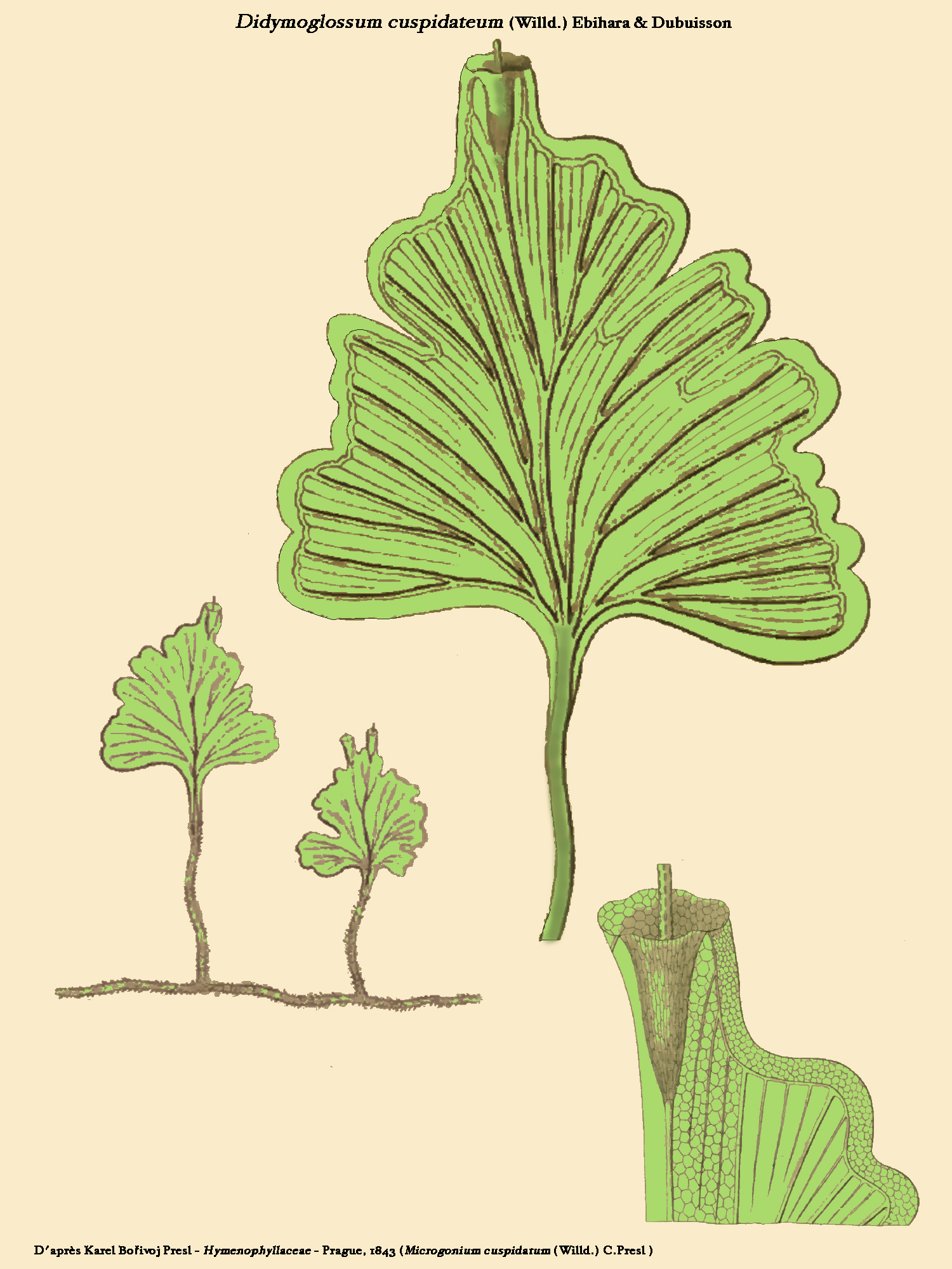 Didymoglossum cuspidatum - d'après C. Presl (Microgonium cuspidatum) - Hymenophyllaceae - 1843 - Image retravaillée par D.Prévôt